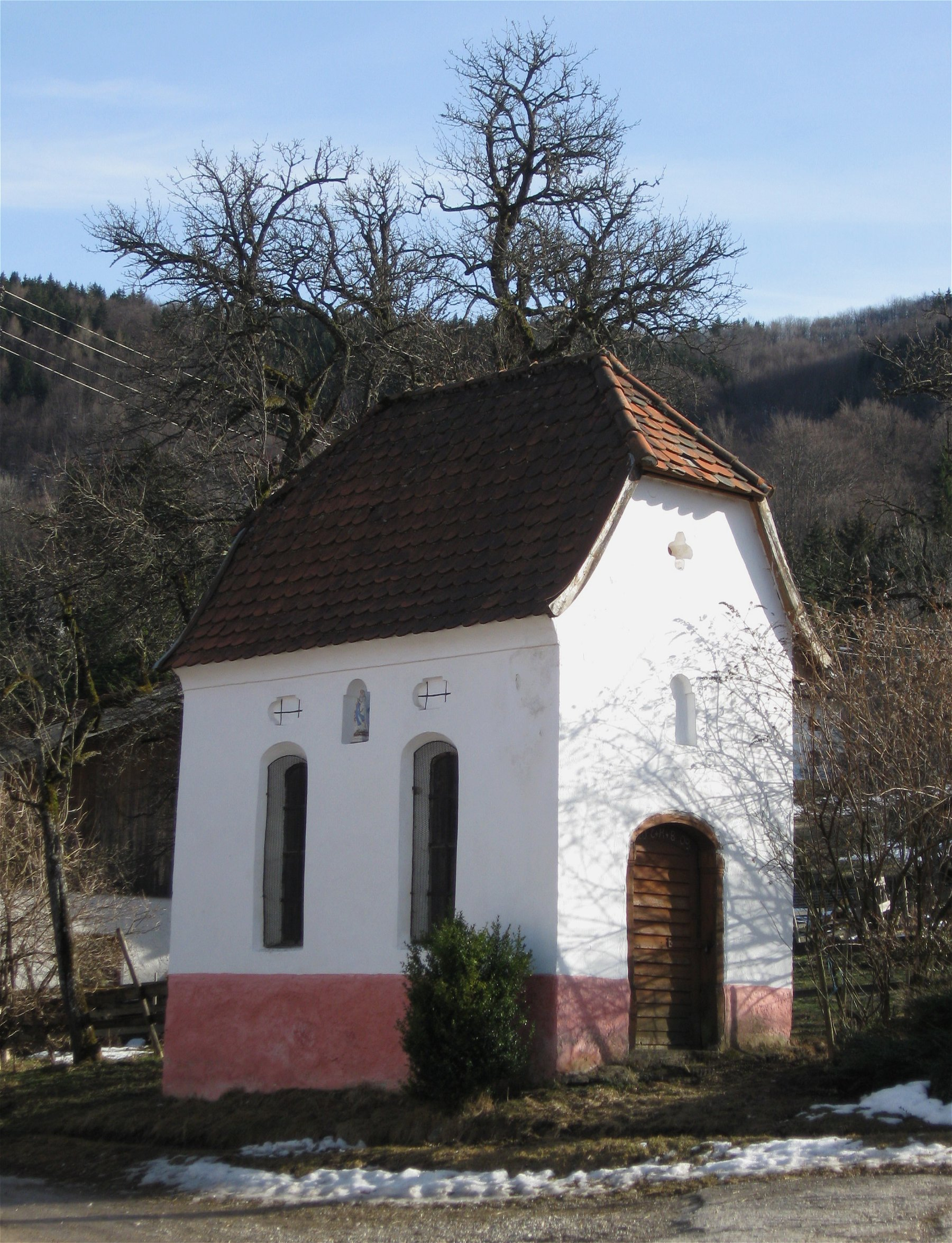 Gritschen (Samerberg), Haus Nr. 45; Hofkapelle, mit Schopfwalmdach, im oberen Teil Bienenhaus eingebaut, 1. Hälfte 19. Jh.